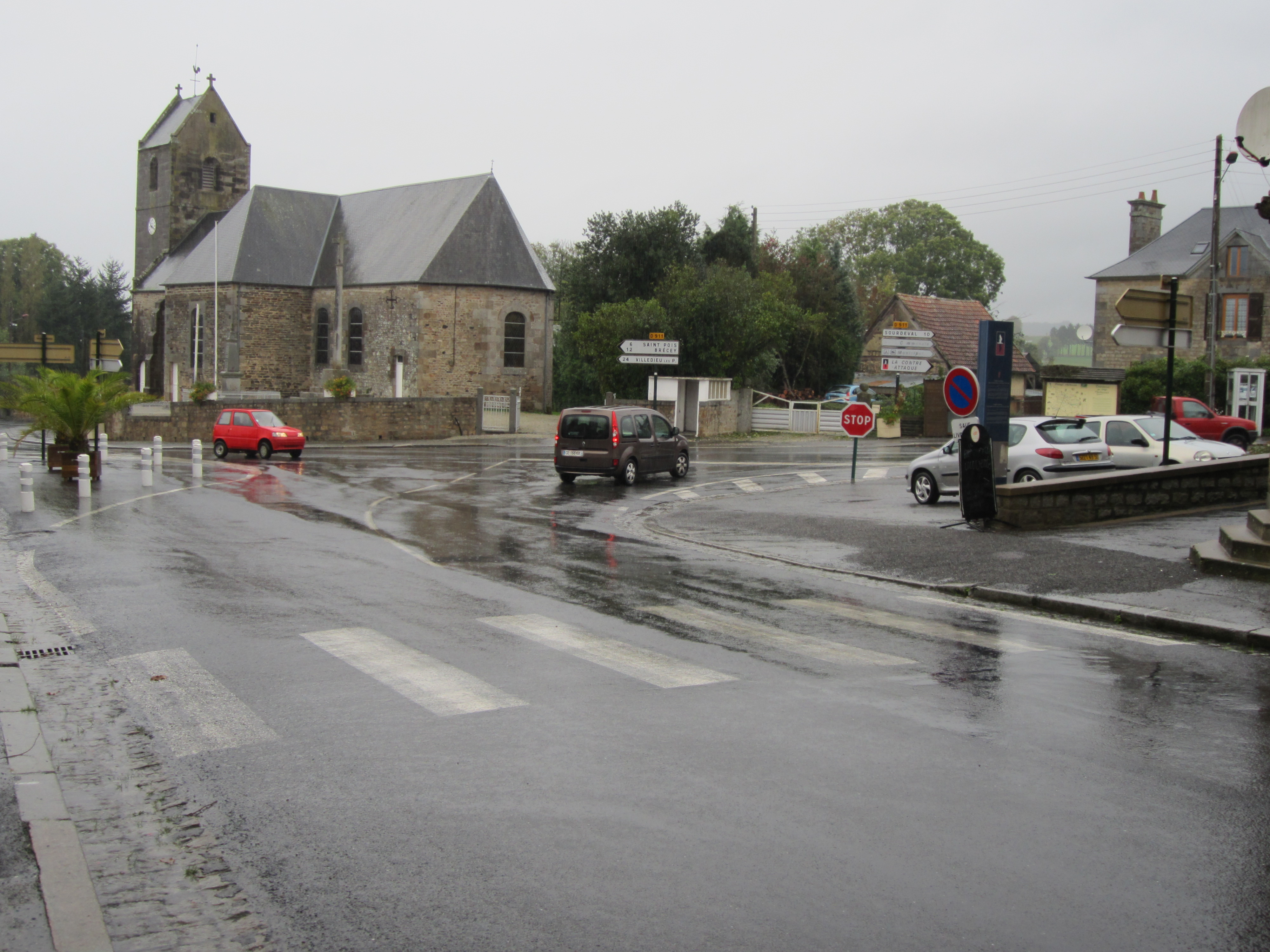 Chérencé-le-Roussel